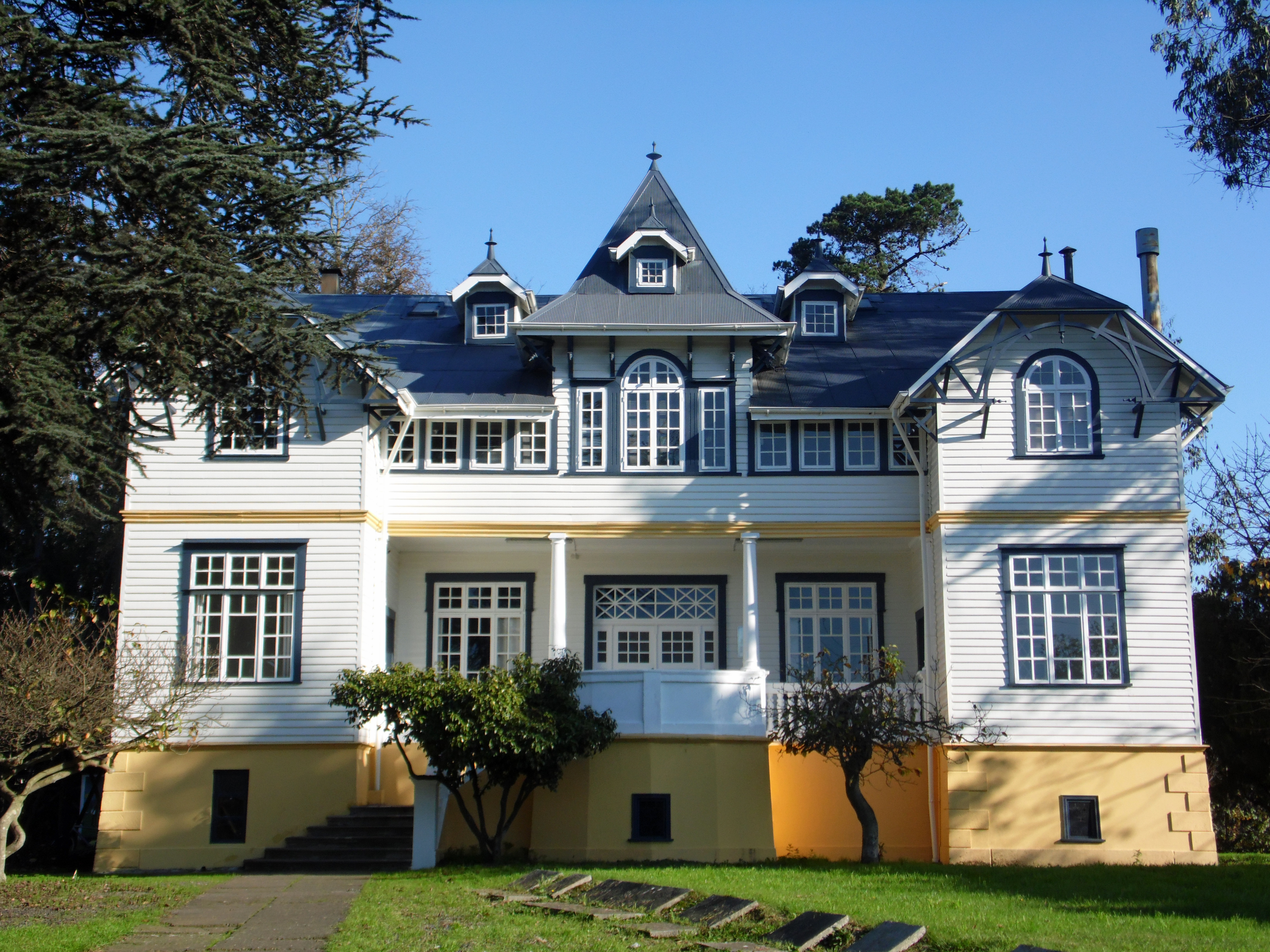 Casa Hollstein, declarada Monumento Histórico en el año 1999. Su entorno fue declarado Zona Típica. Forma parte del Legado Bicentenario. This is a photo of a national monument in Chile: 719